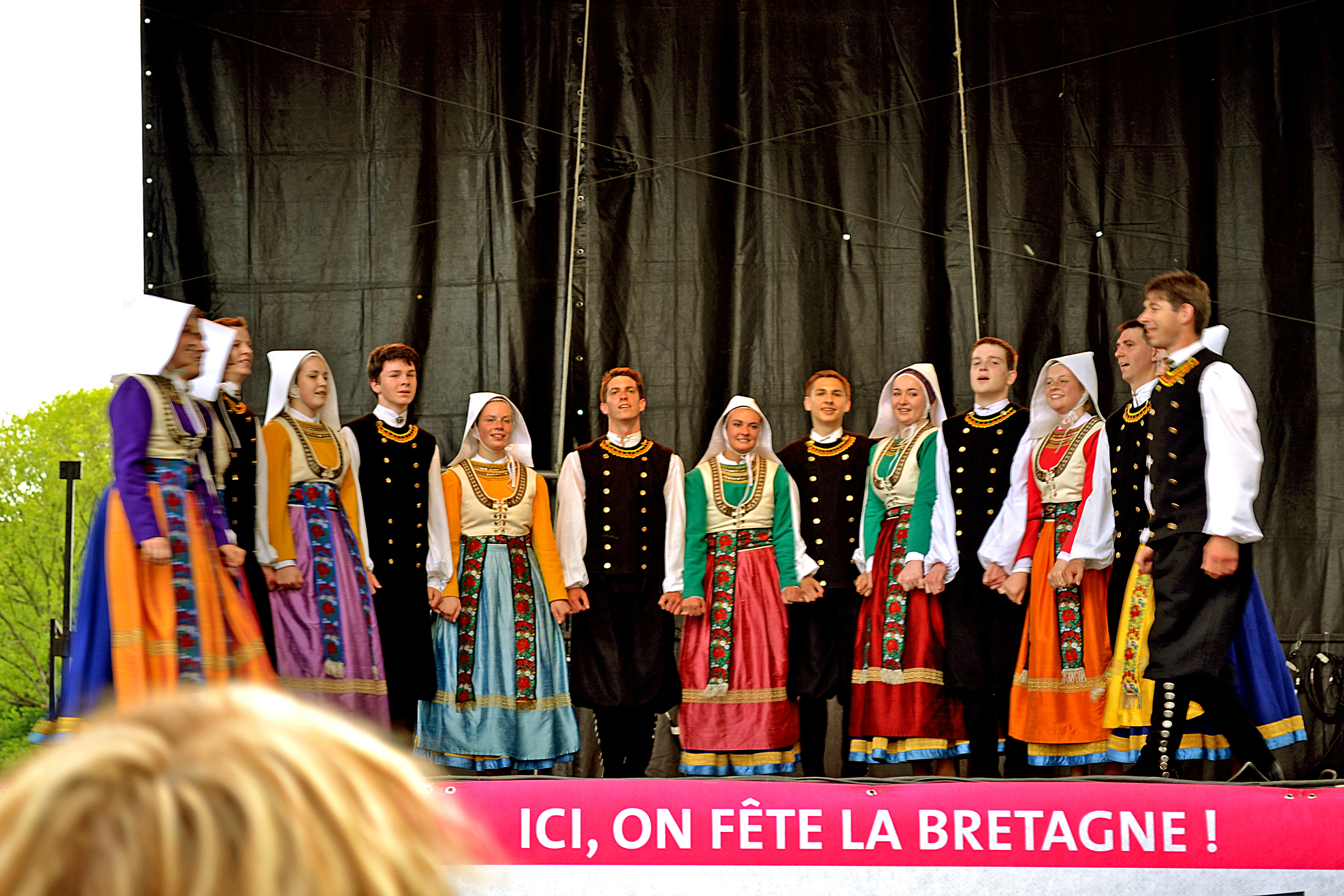 3e édition du festival Gouel Bro Leon au plan d'eau à Plouvorn le 24 mai 2015